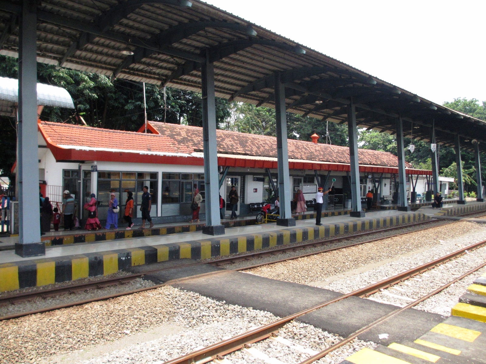 Bangunan Stasiun Lamongan.